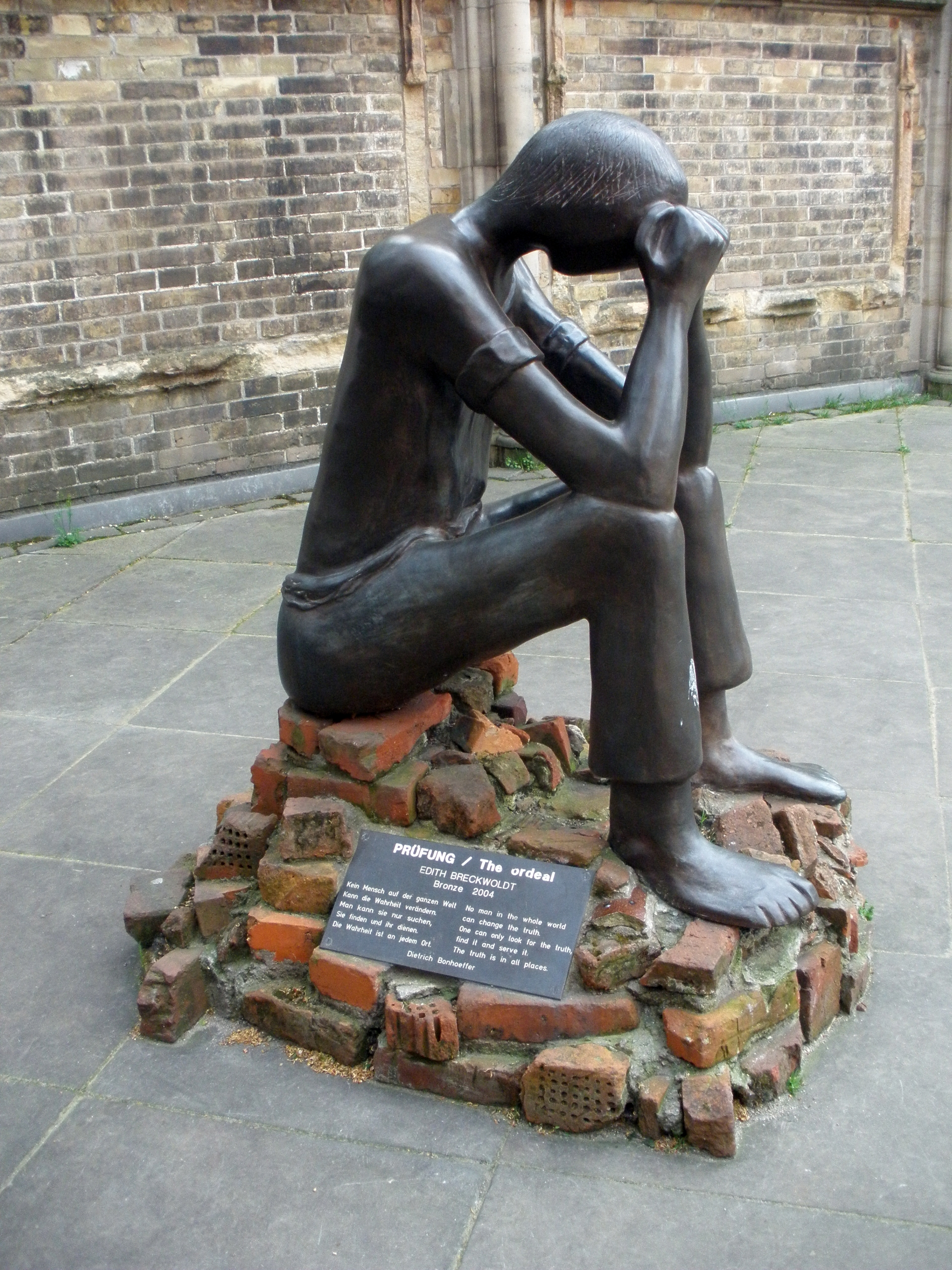 skulptur prüfung mit angeblichem, nicht verifiziertem bonhoeffer zitat